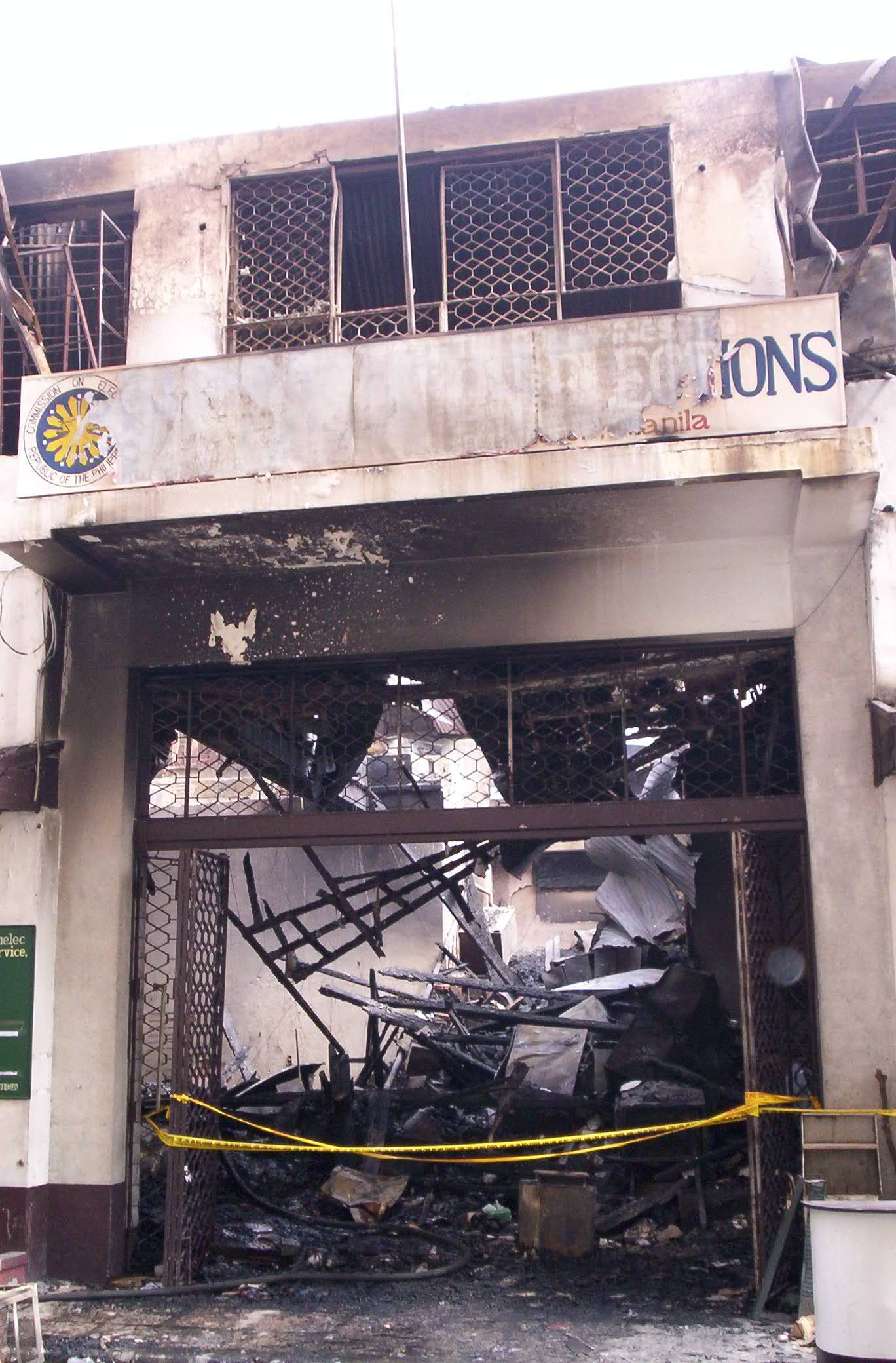 Tagalog: Ang larawang ito ay kinunan ko noong ika-5 ng Marso, 2007